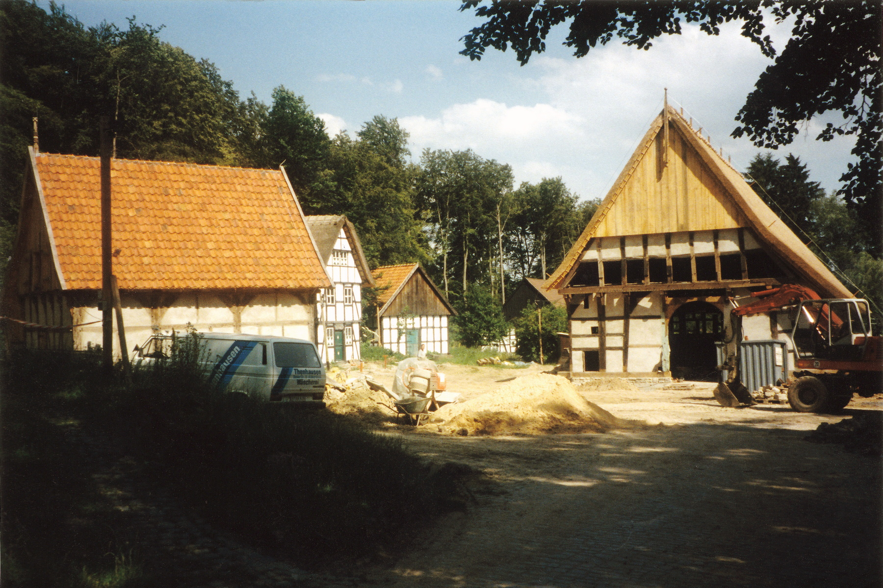 Bielefeld, Bauernhausmuseum. Aufbau des Haupthauses "Hof Möllering" im Juli 1998